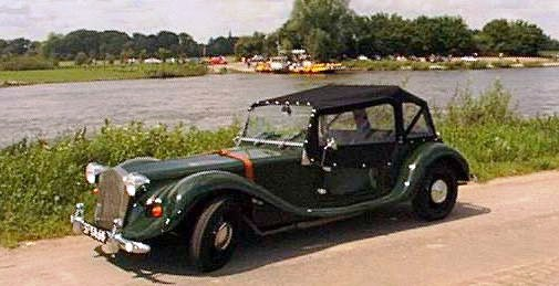 Cugnys met all weather kit. Eigen gemaakte foto gemaakt door dhr. Onderstal en geupload door kitcar collega Wim van den Bergh